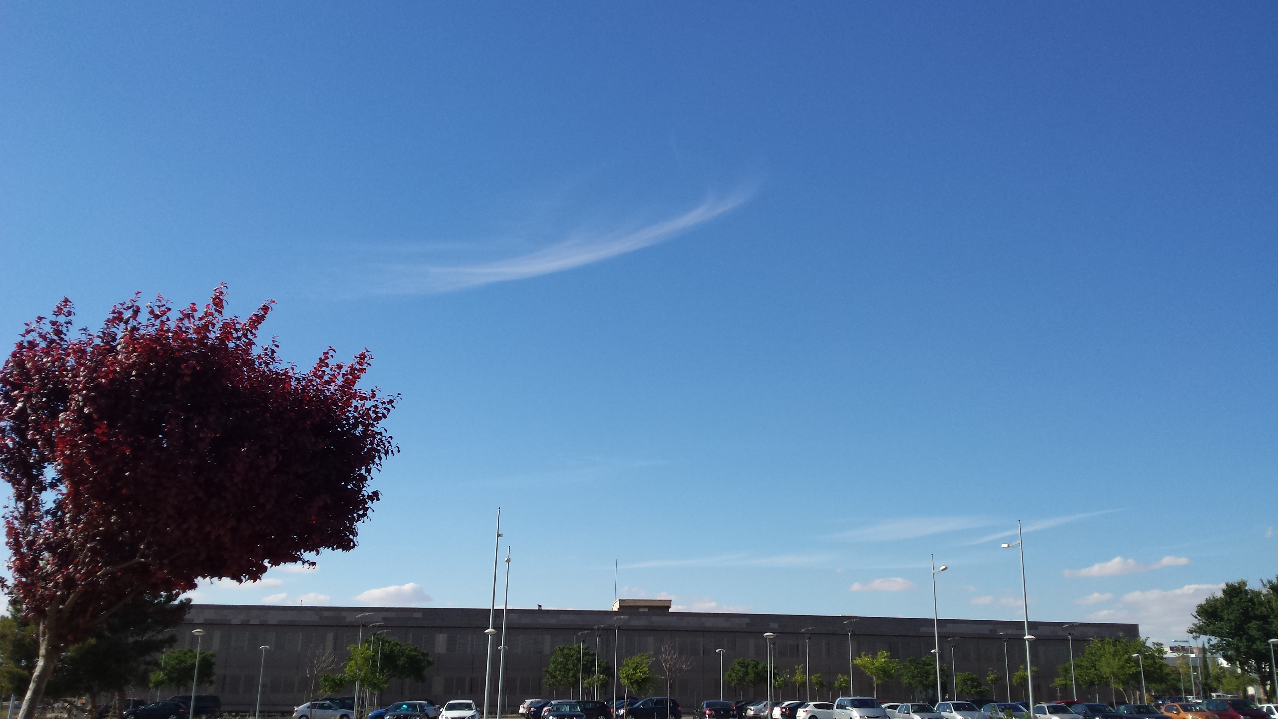 Vista del Centro I+D Empresas del Parque Científico y Tecnológico de Albacete (PCYTA) desde la Avenida de La Mancha o Ab-20 (Segunda Circunvalación de Albacete). Albacete